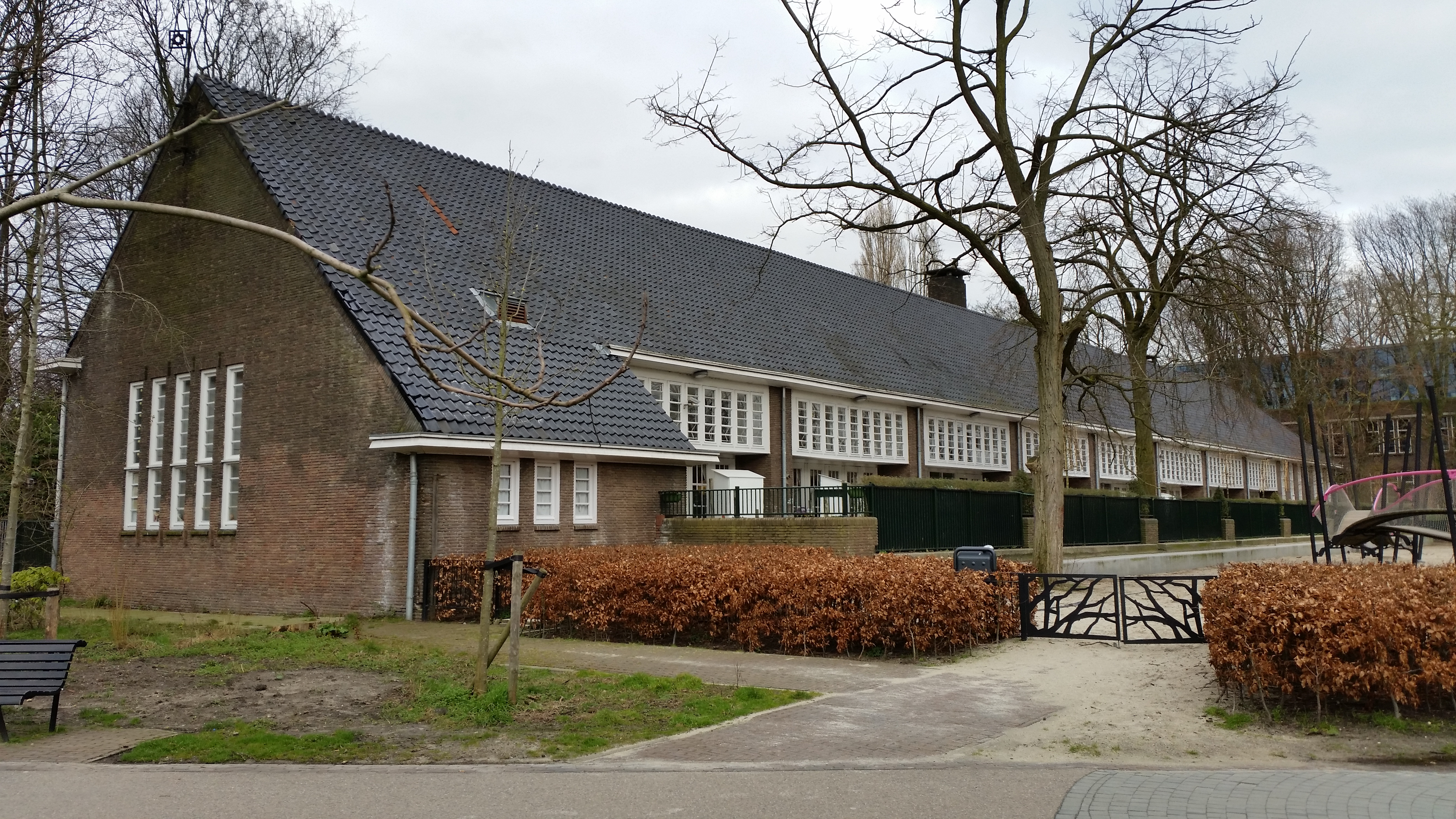 Impressie van Mauritskade 56, Amsterdam (februari 2020)